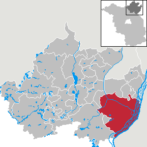 Schwedt/Oder in Brandenburg (Country) - District Uckermark